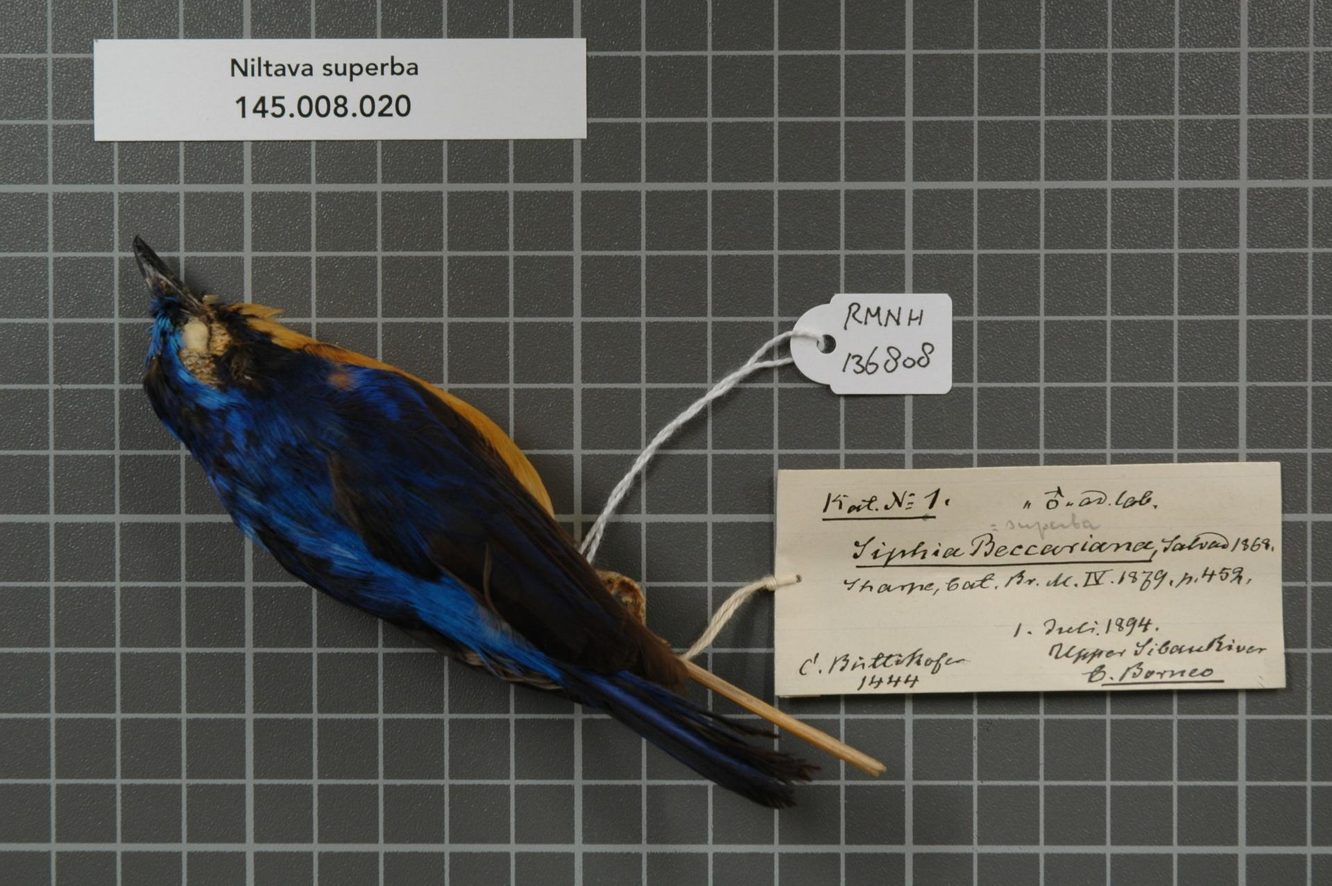 Niltava superba (Stresemann, 1925)